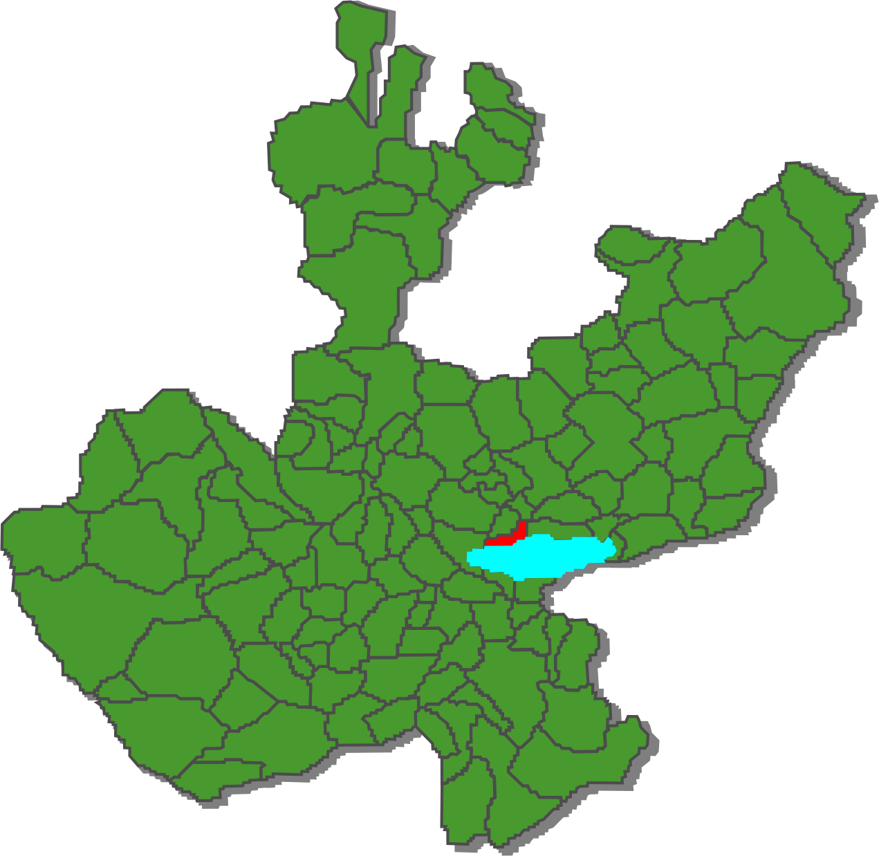 Mapa de ubicación del municipio de Chapala en Jalisco.